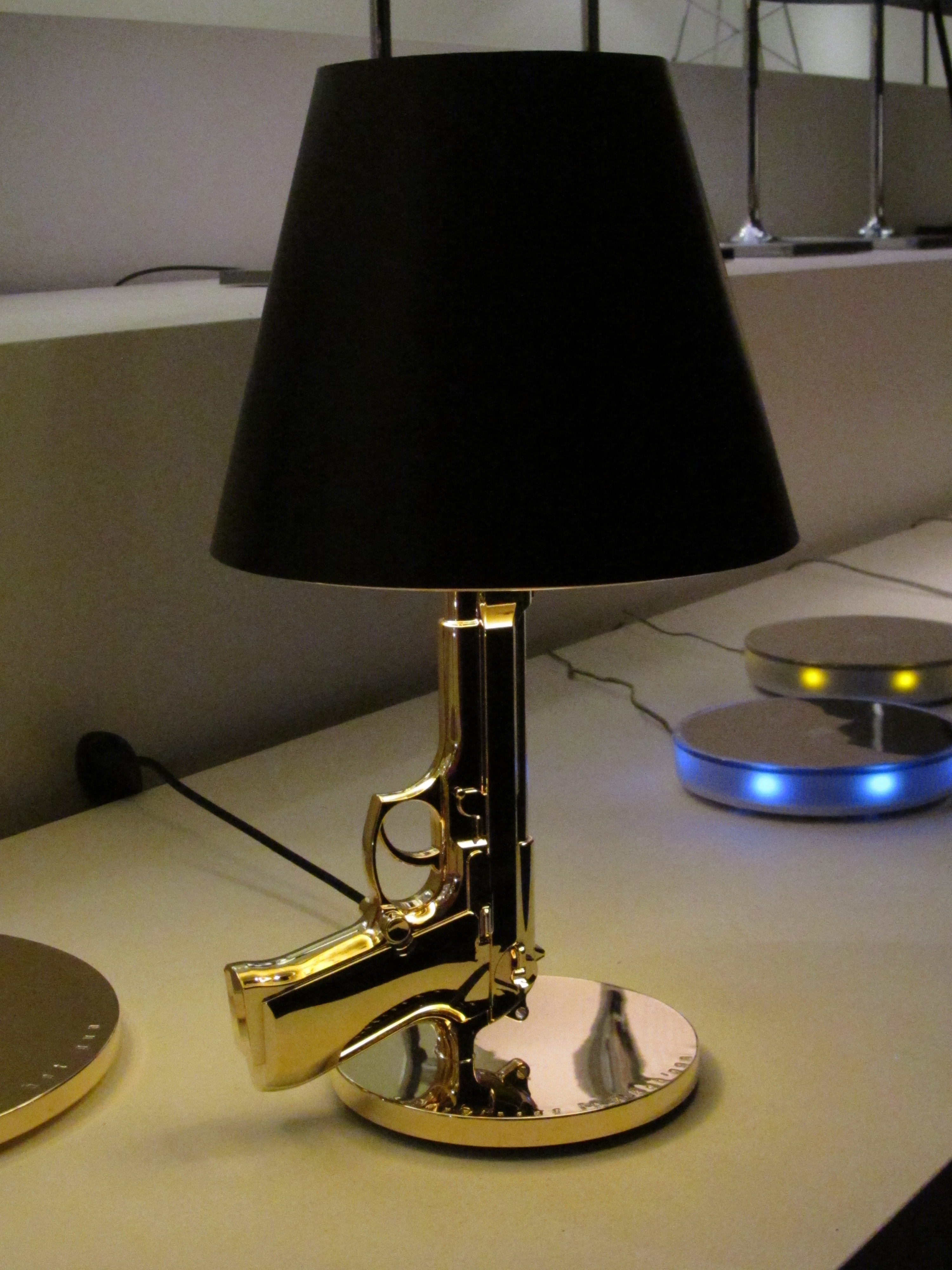 La lampada "Gun" durante l'anniversario dei 50 anni dell'azienda tenutosi a Milano durante il fuorisalone 2012 presso il palazzo della permanente